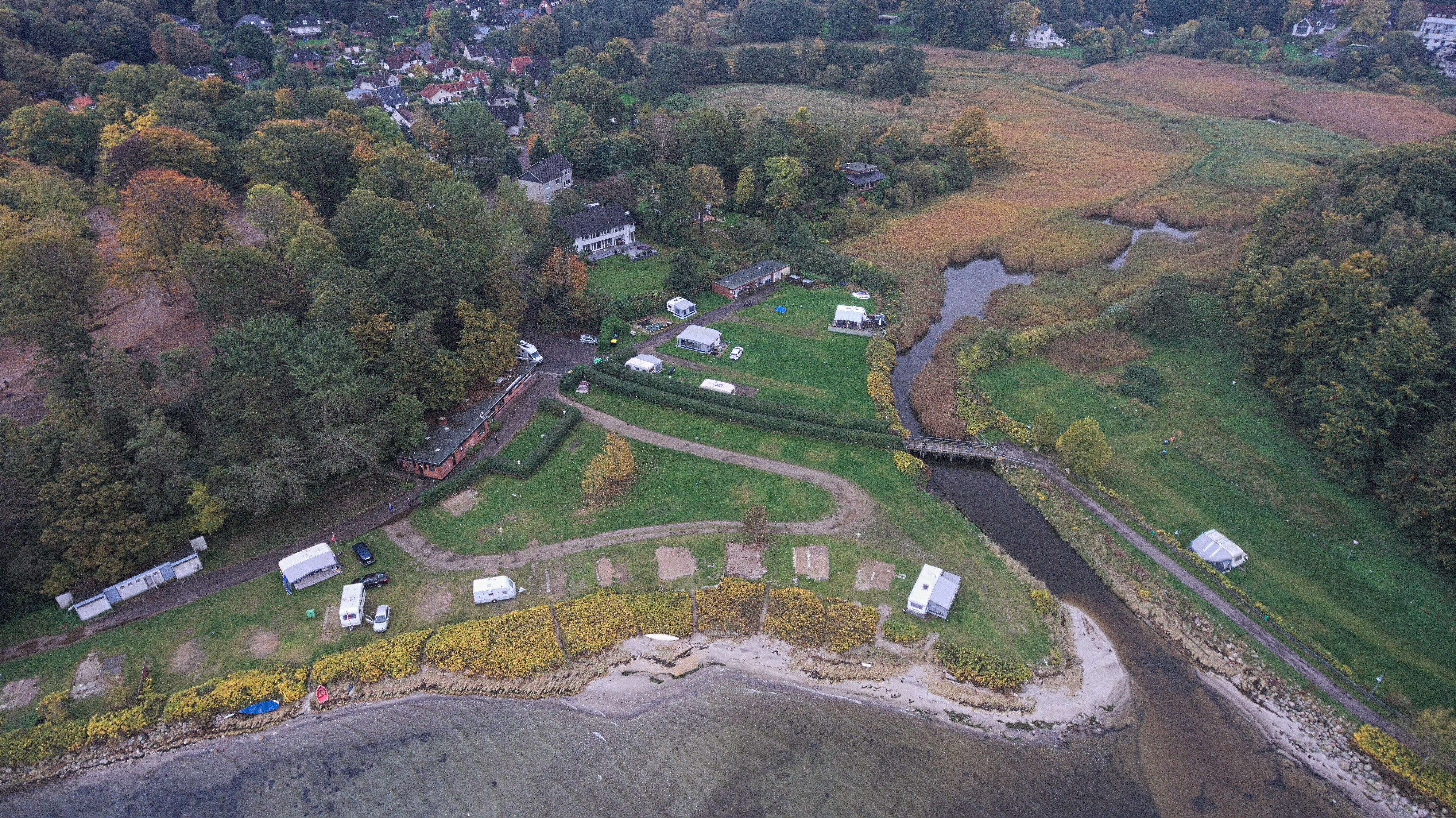 Campingplatz Schwennau in Gluecksburg